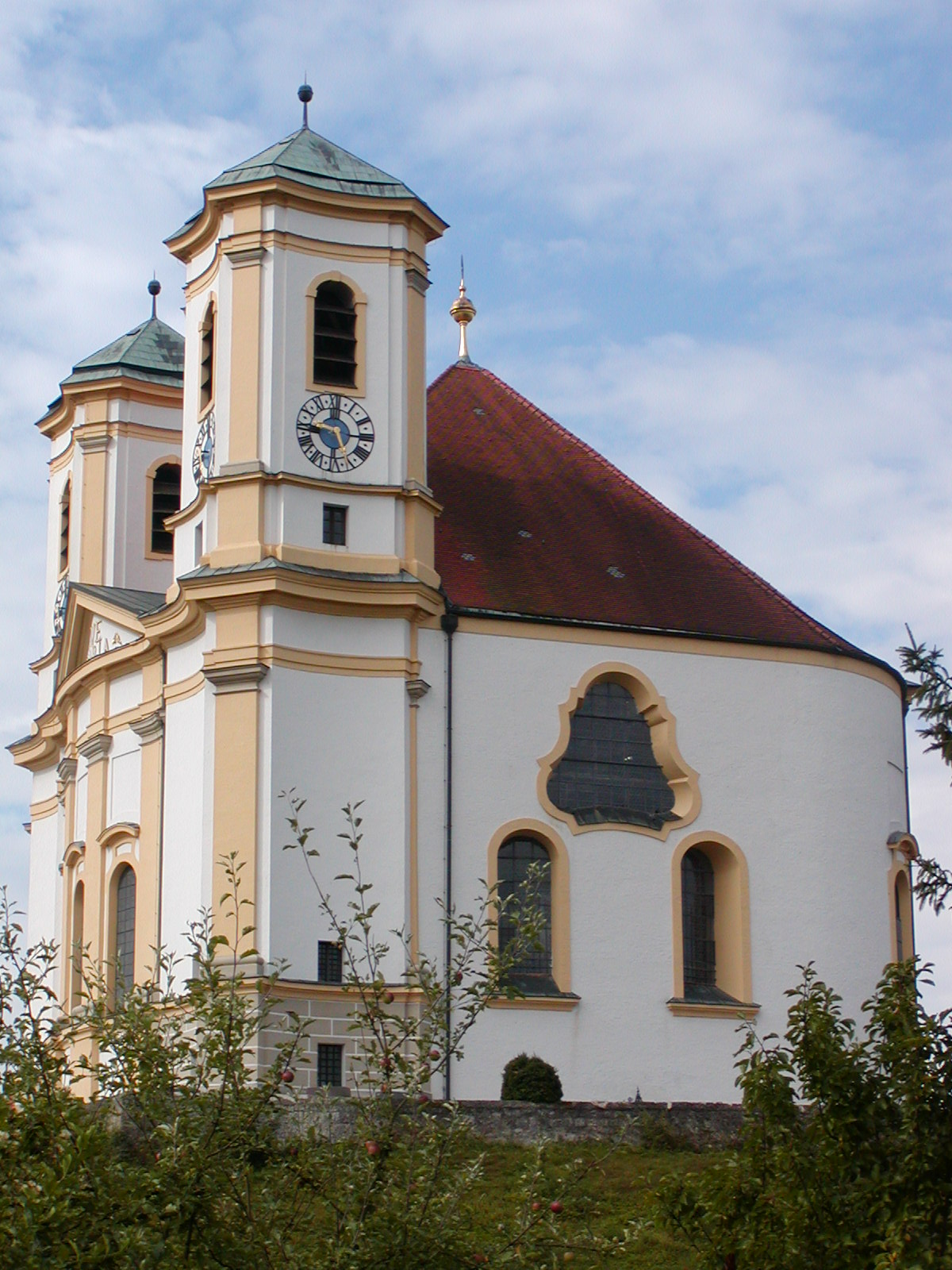 Aufnahme der Rokokokirche Marienberg (Burghausen) im Sommer von der Nord-Ost-Seite